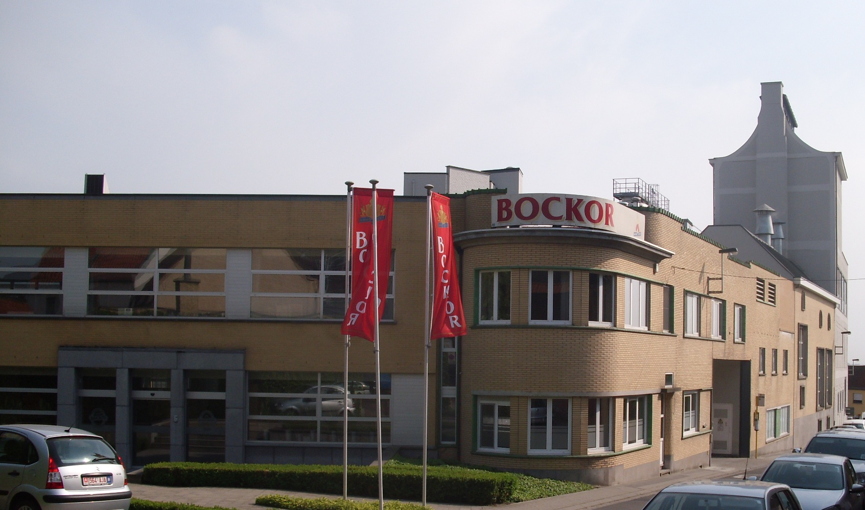 Brouwerij Bockor - Kwabrugstraat 5 - Bellegem - Kortrijk - West-Vlaanderen - Vlaams Gewest - België